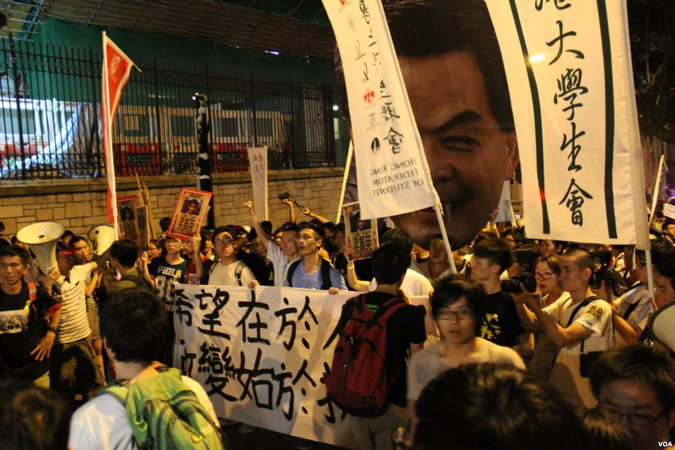 學聯發起抗議梁振英拒絕對話公民抗命遊行和留守禮賓府